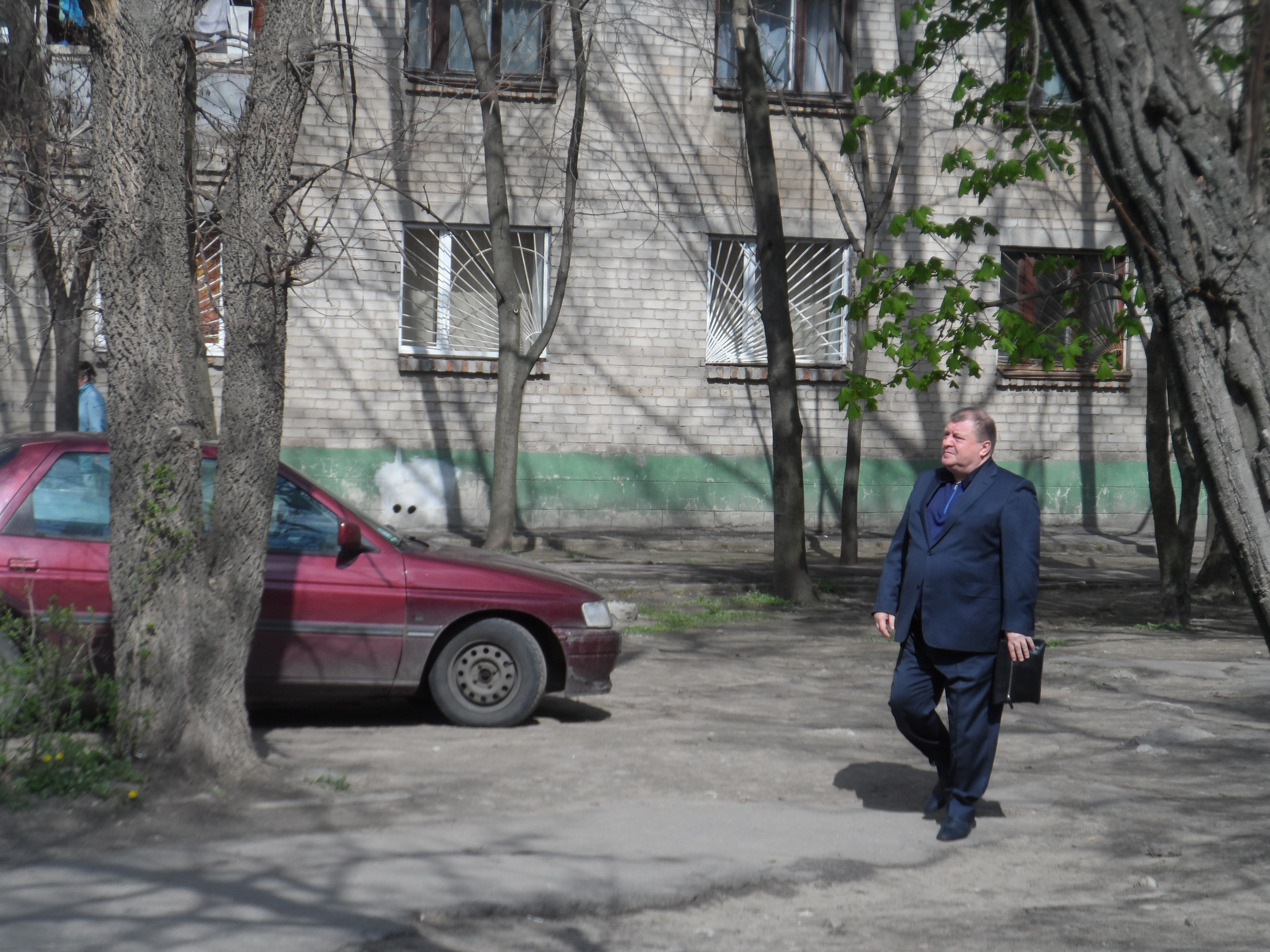 Идет в суд